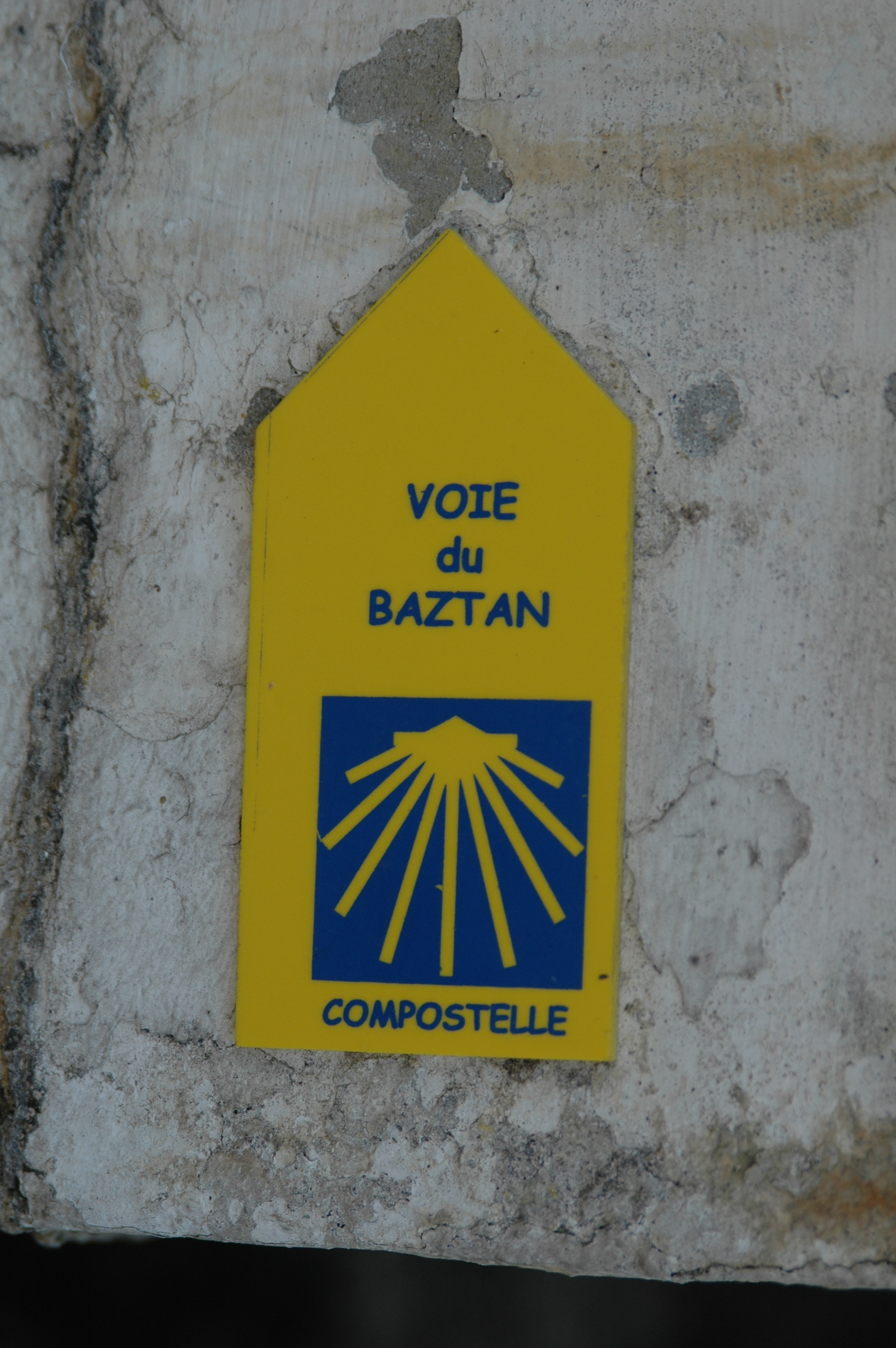 Ainhoa, sur le chemin de St. Jacques de Compostelle, prise le 08/07/06 par Harrieta171